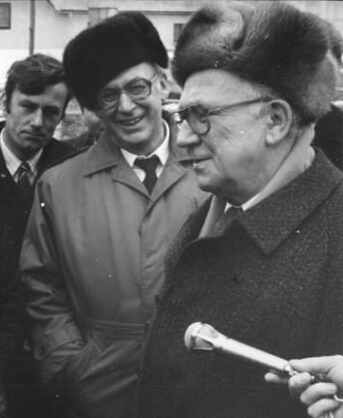 Title: Kaltensundheim, Besuch Arbeitsgruppe DDR-Staatsrat People in the image: Sindermann, Horst: Volkskammerpräsident, stellvertretender Staatsratsvorsitzender, DDR * Albrecht, Hans: 1. Sekretär der Bezirksleitung Suhl der SED, DDR Factual corrections and alternative descriptions are encouraged separately from the original description. Additionally errors can be reported at this page to inform the Bundesarchiv. Original historic description: ADN-ZB Schaar 24.2.88 Bez. Suhl: Arbeitsgruppe Eine Arbeitsgruppe des Staatsrates unter Leitung von Volkskammerpräsident Horst Sindermann, Mitglied des Politbüros, begann einen zweitägigen Einsatz im Kreis Meiningen. In der über 1000 Einwohner zählenden Rhöngemeinde Kaltensundheim führte die Abordnung u.a. Gespräche mit Genossenschaftsbäuerinnen. 2.v.r.: Hans Albrecht, 1. Sekretär der SED-Bezirksleitung Suhl.